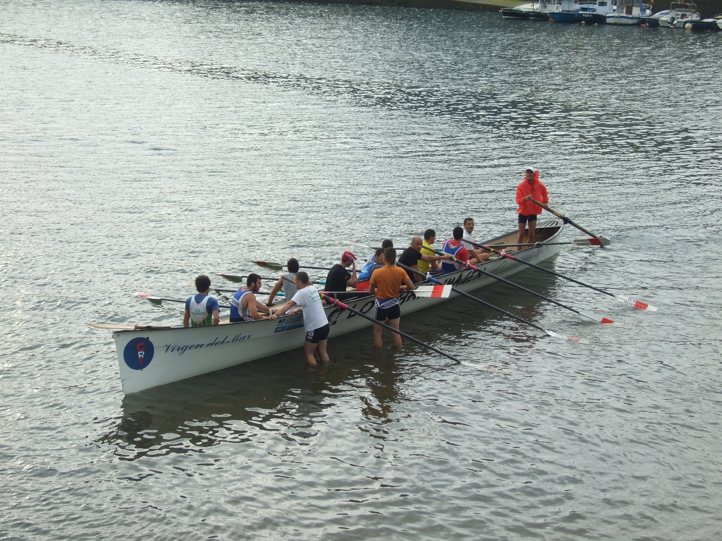 Entrenamiento del Club de Remo Santander en junio de 2011.